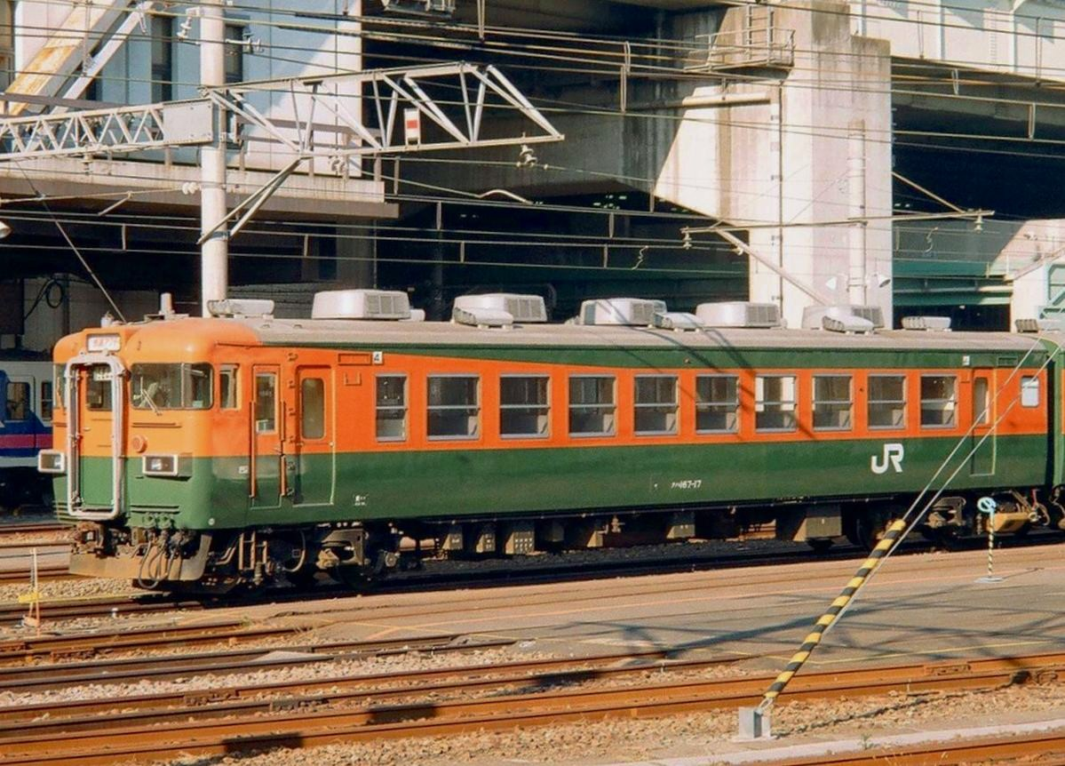 Eest Japan Railway Type167 Train(Japan). It takes a picture of the place taken into custody at the JR Omiya factory. JR東日本167系電車。 JR大宮工場に留置されている所を撮影。 この167系電車は田町電車区に配置されていた車両（H19編成）である。 JR化後、前照灯を角形ライトに改造され、座席をバケットタイプのボックスシートに交換する等の車両の内装改造を施された。